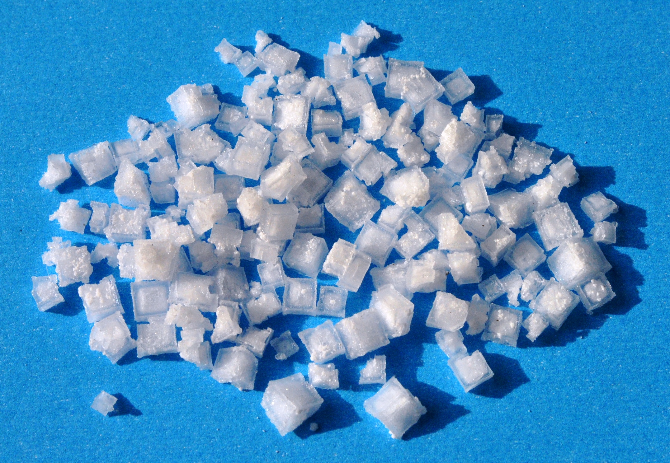 Los cristales se formaron después de la evaporación del agua de una solución saturada de cloruro de sodio.